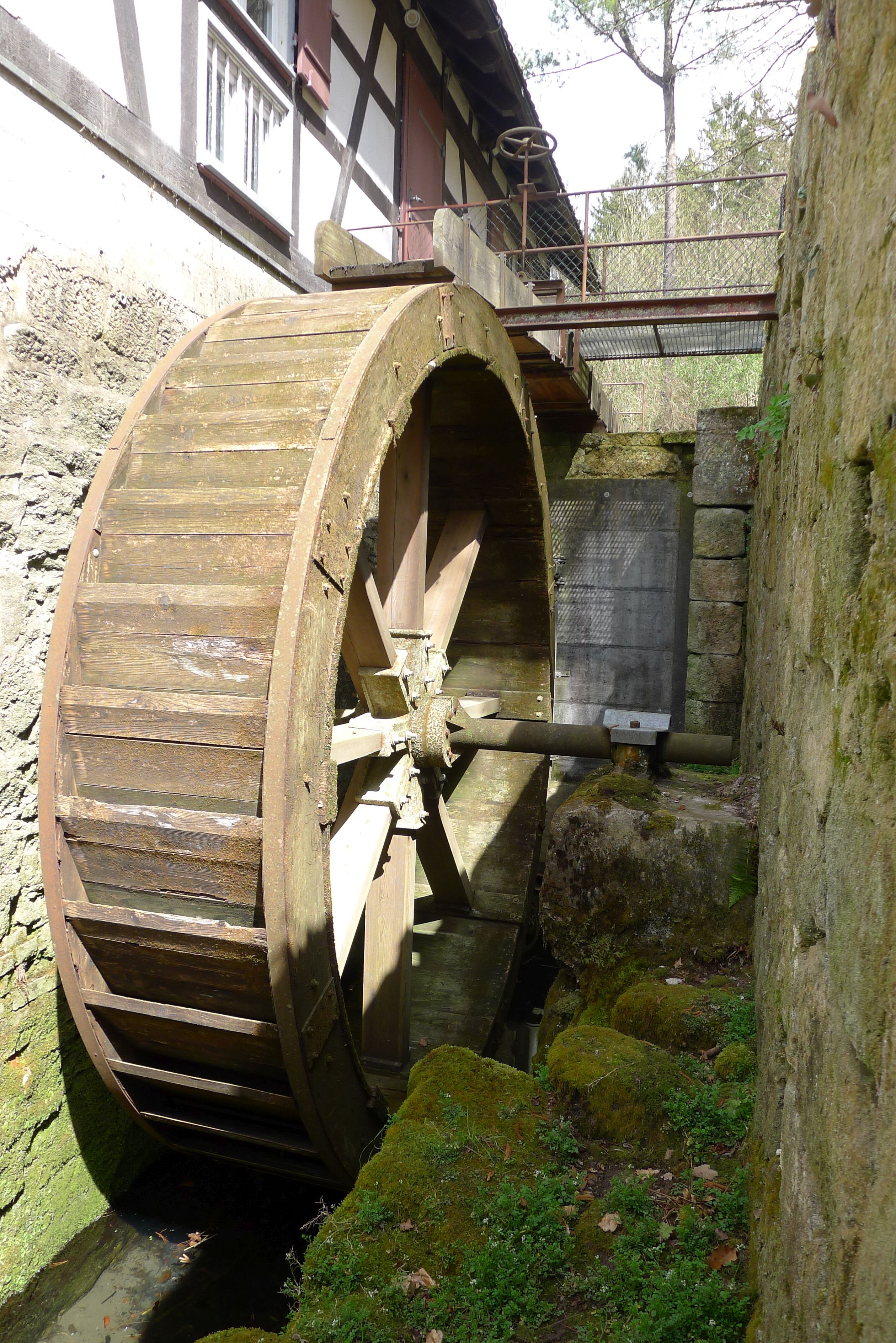 Het waterrad van de Mäulesmühle wordt iedere zondag om 17.00 uur via waterpompen aan belangstellenden gedemonstreerd.